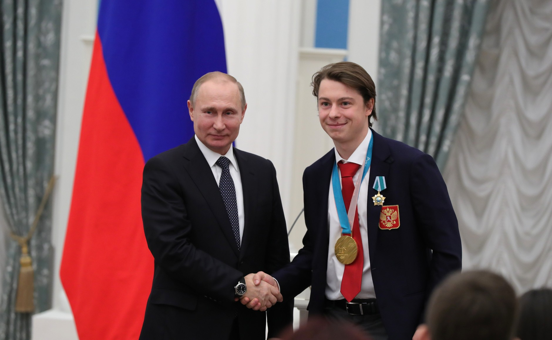 С олимпийским чемпионом по хоккею Никитой Гусевым.